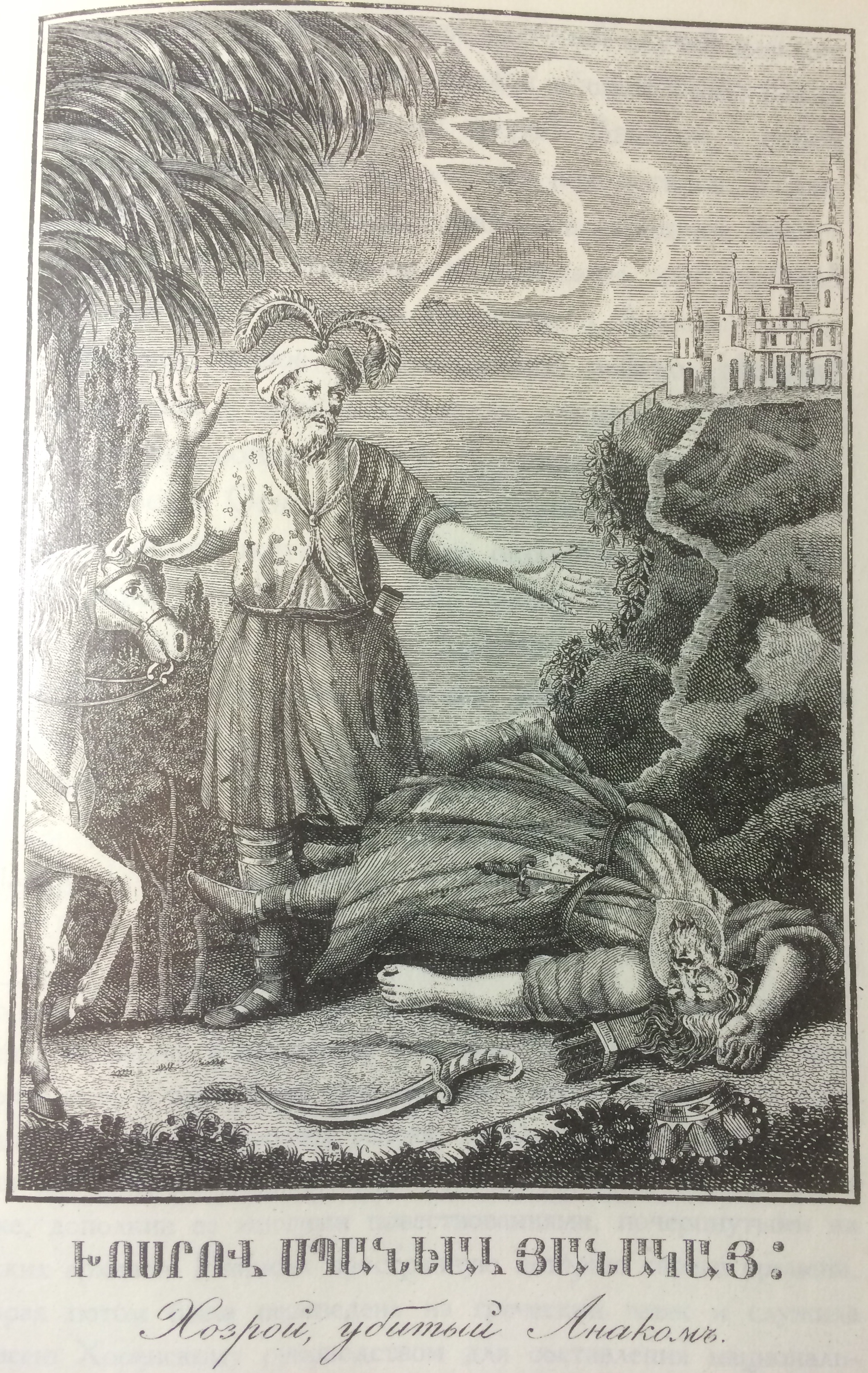 Խոսրով Բ թագավորը, սպանված Անակի կողմից